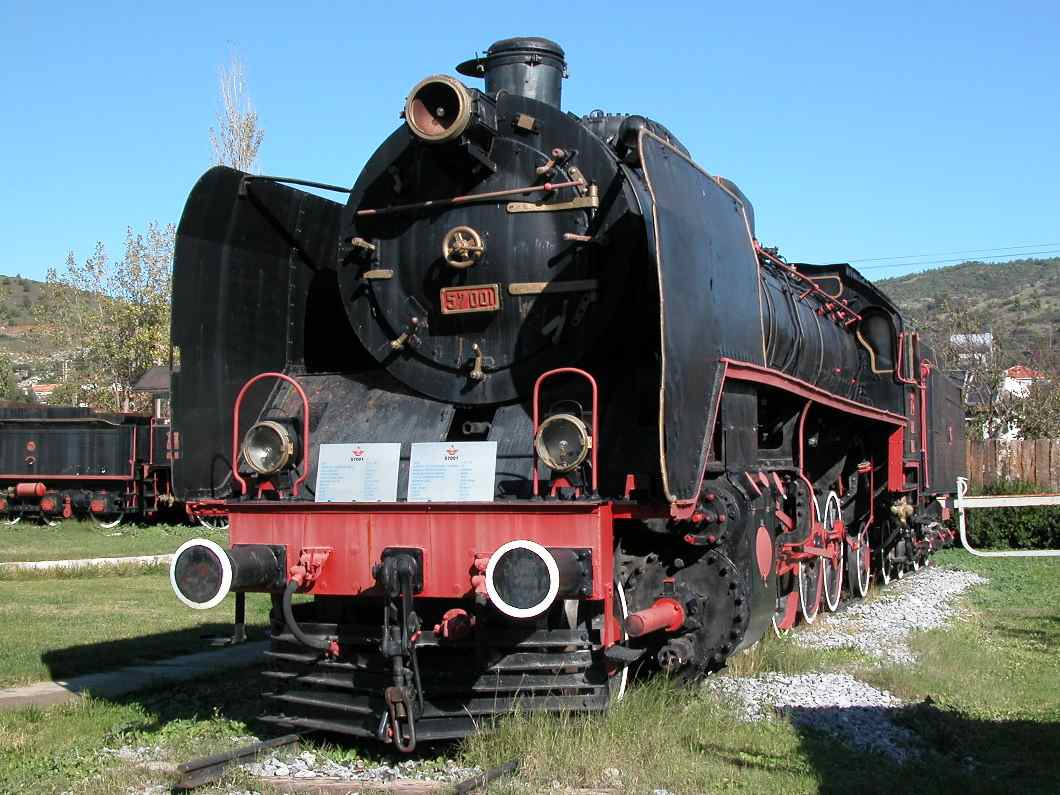 57 001 Camlik